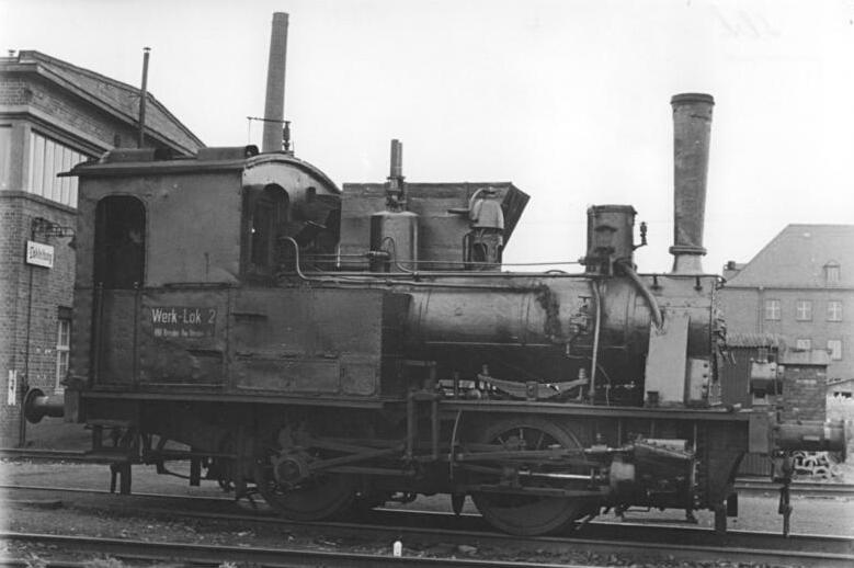 Dampflok "Werk-Lok 2" Zentralbild Schmidtke 7.8.1952 Lokomotivtypen der Deutschen Reichsbahn. UBz: Dampflokomotive "Werk-Lok 2", Bahnbetriebswerk Dresden